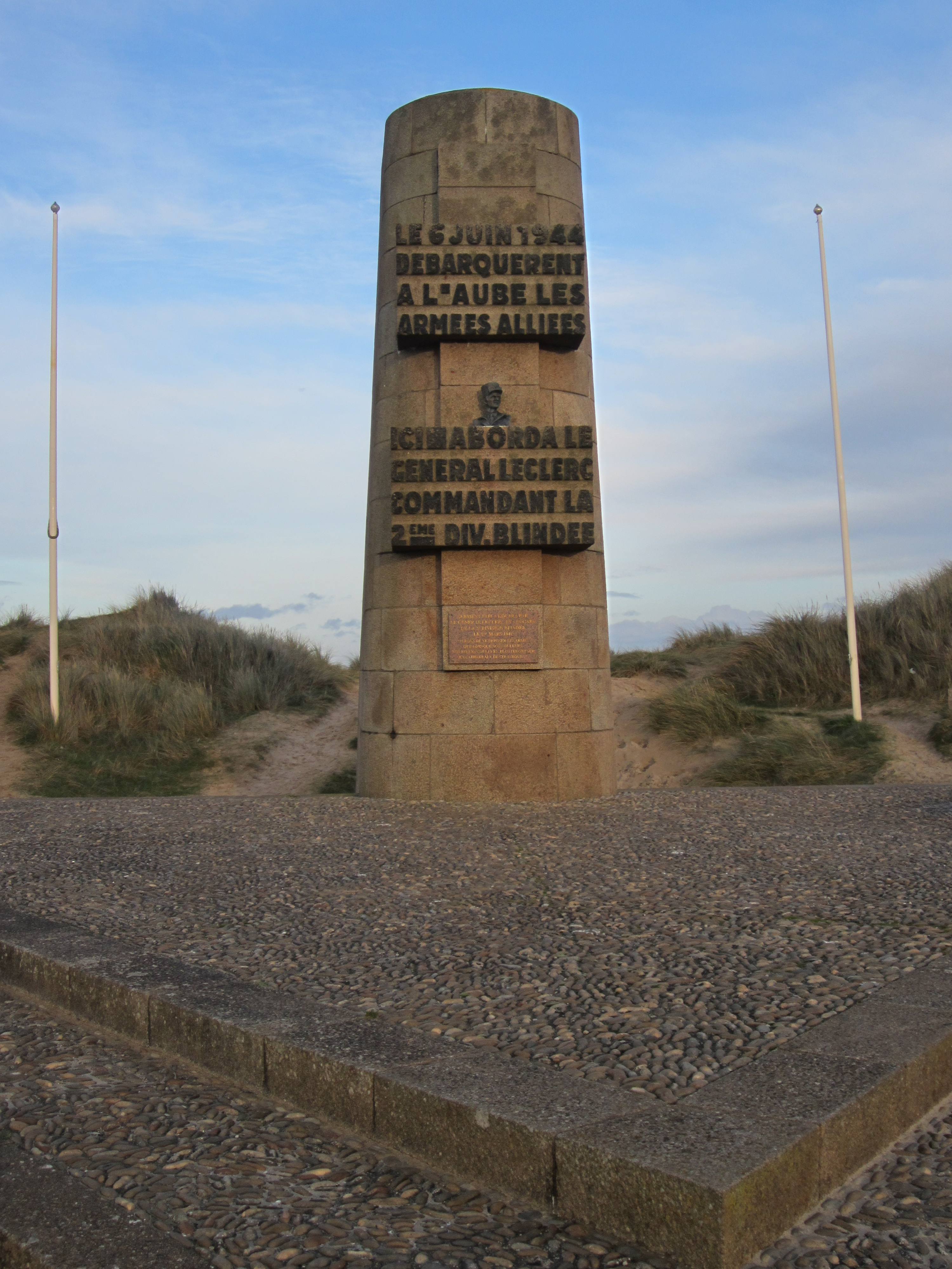 Saint-Martin-de-Varreville, Manche